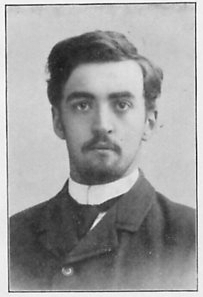 H. Hodler, Ĝenevo, redaktoro de "Juna Esperantisto"